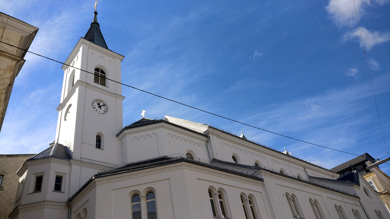 Klosterkirche vom Armen Kinde Jesu, Wien